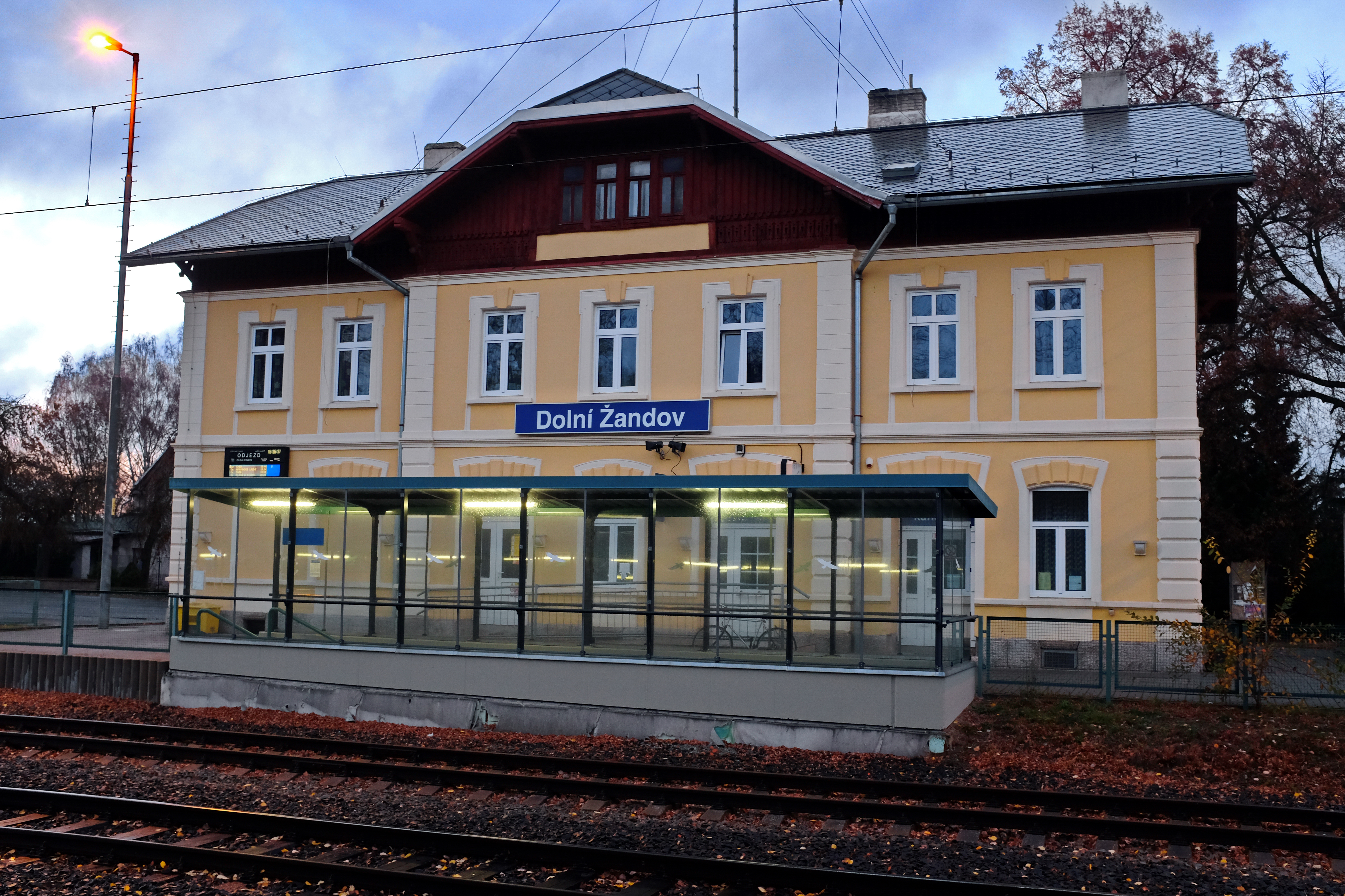 Dolní Žandov, vlakové nádraží